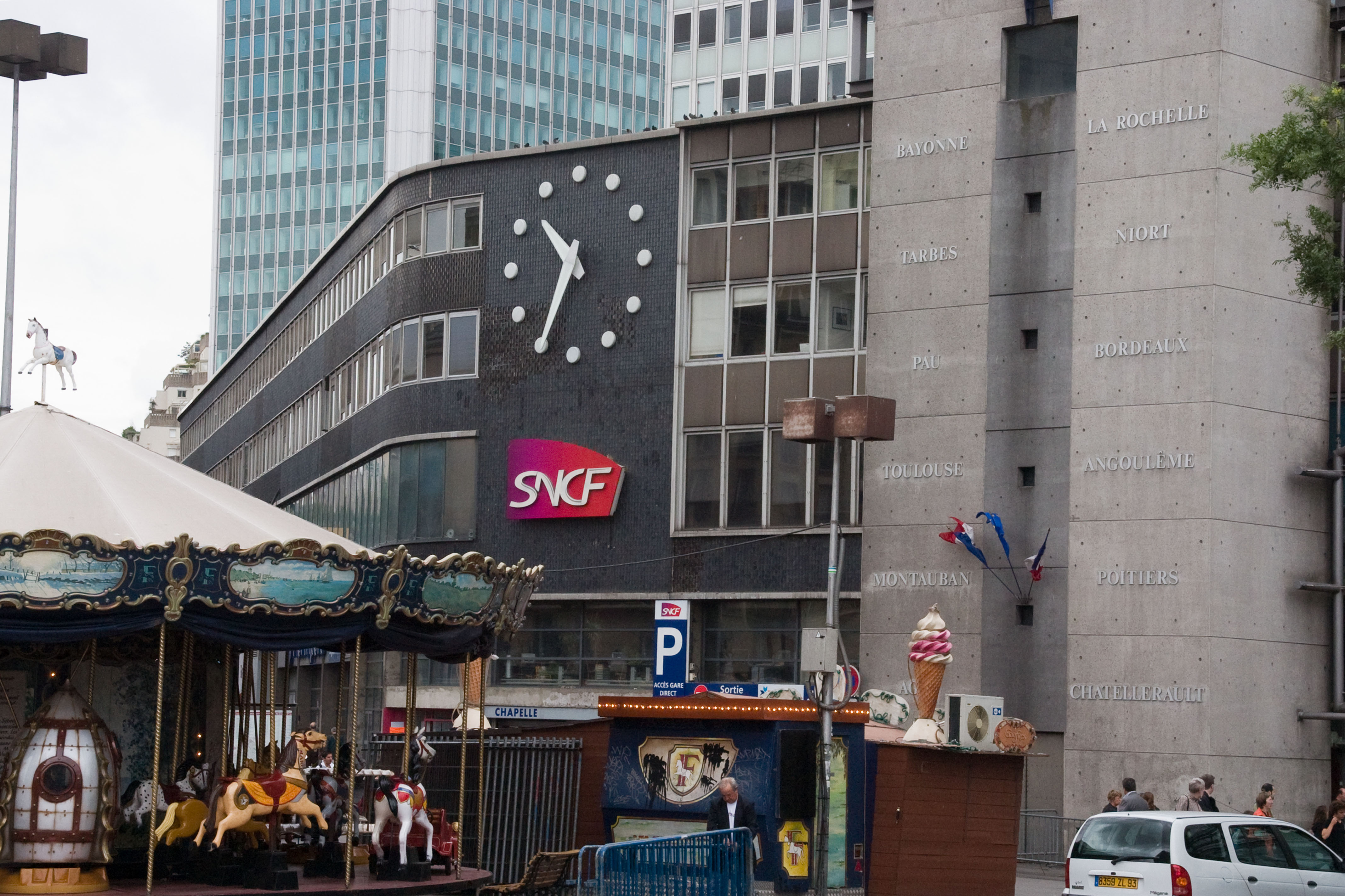 Gare de Paris-Montparnasse, Paris, France